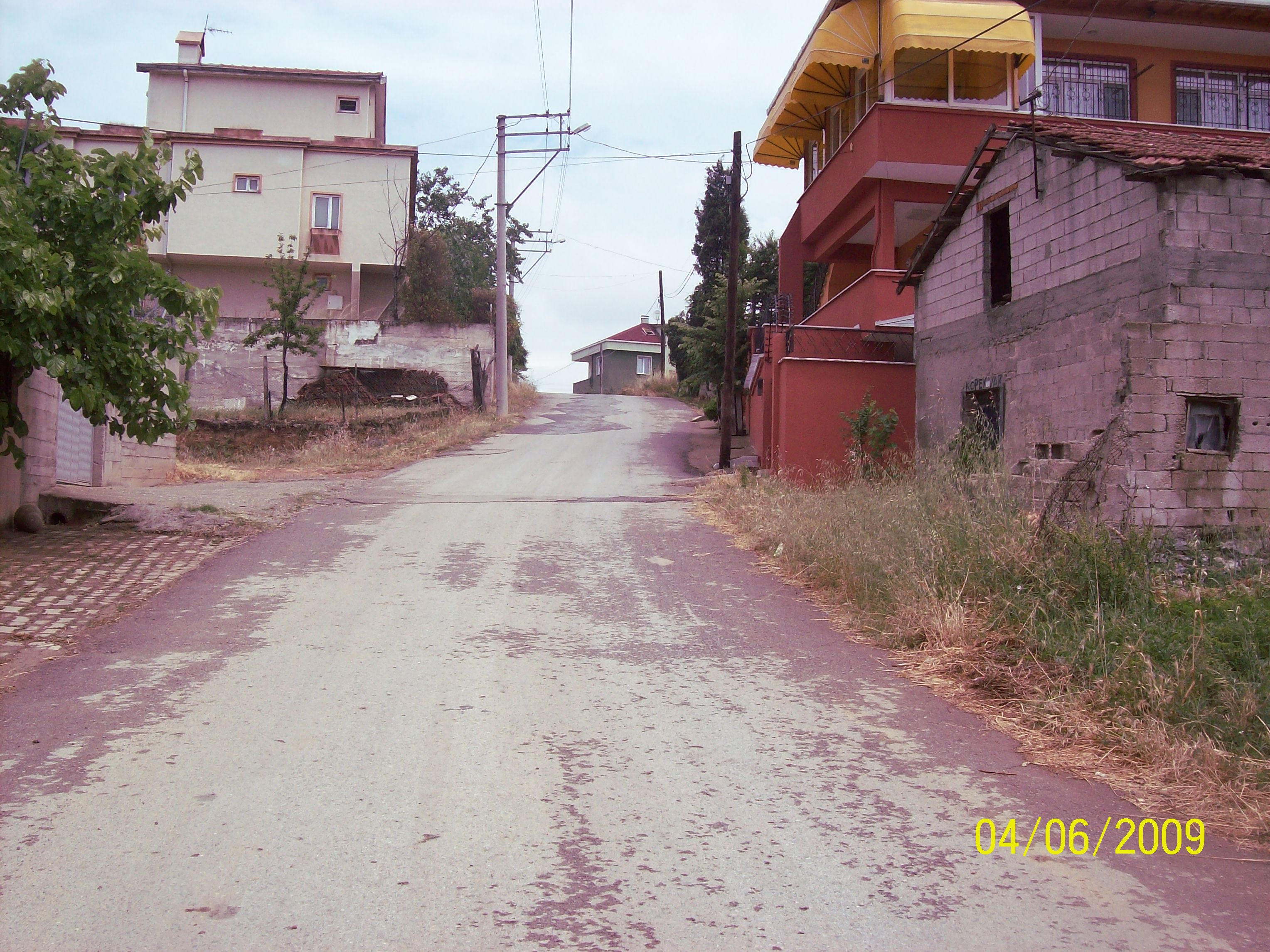 Darıca - Bayramoğlu Karadut Sokak